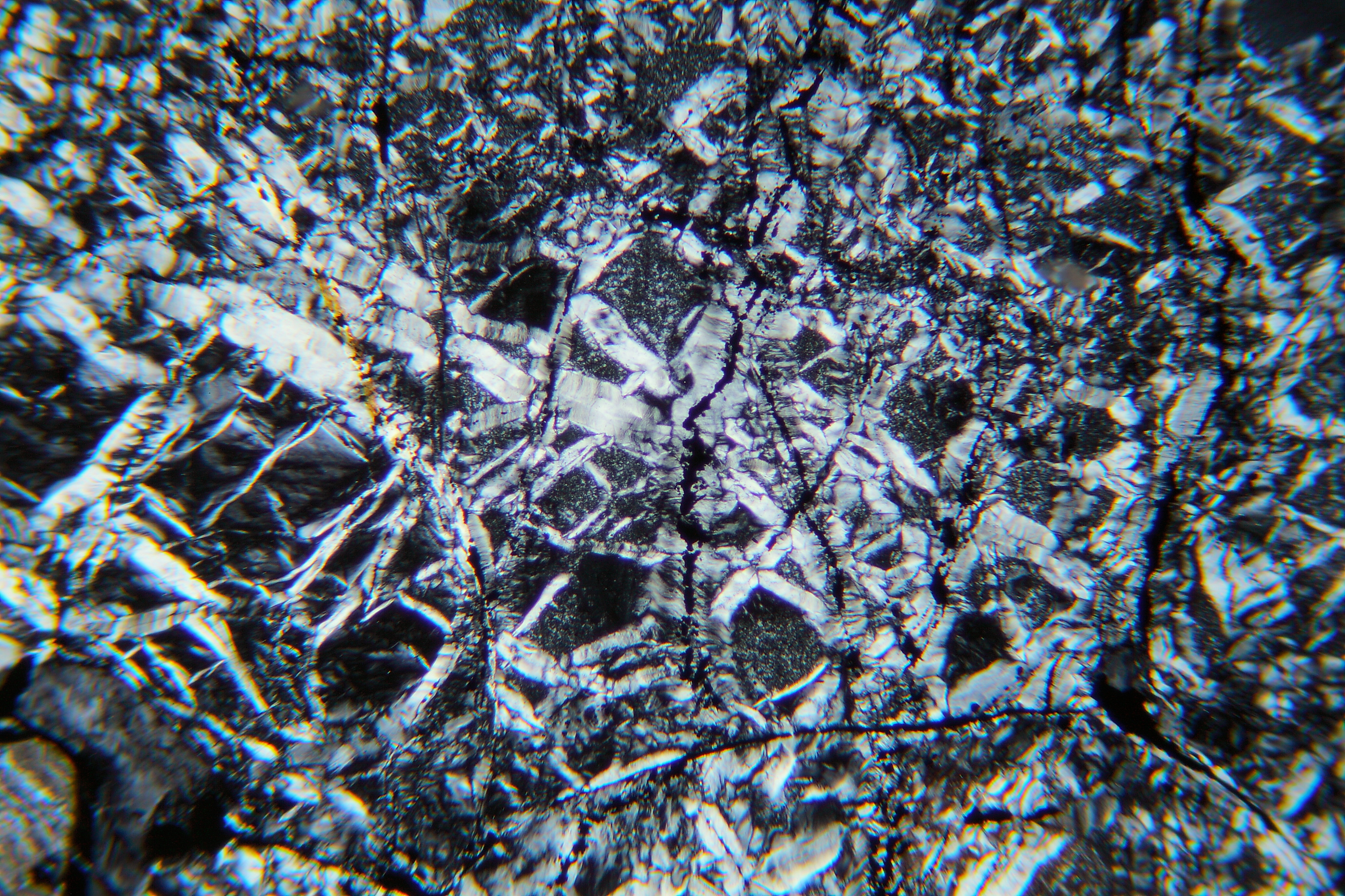 Serpentinit (Dünnschliff, XPL): Die Maschenstruktur von Chrysotil ist erkennbar